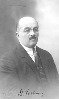 Mihhail Kurtšinski, vene majandusteadlane